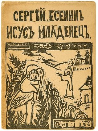 Сергей Есенин; [обложка, рисунки и клише работы Е. Туровой] - Пг.: Артель художников "Сегодня", [1918]